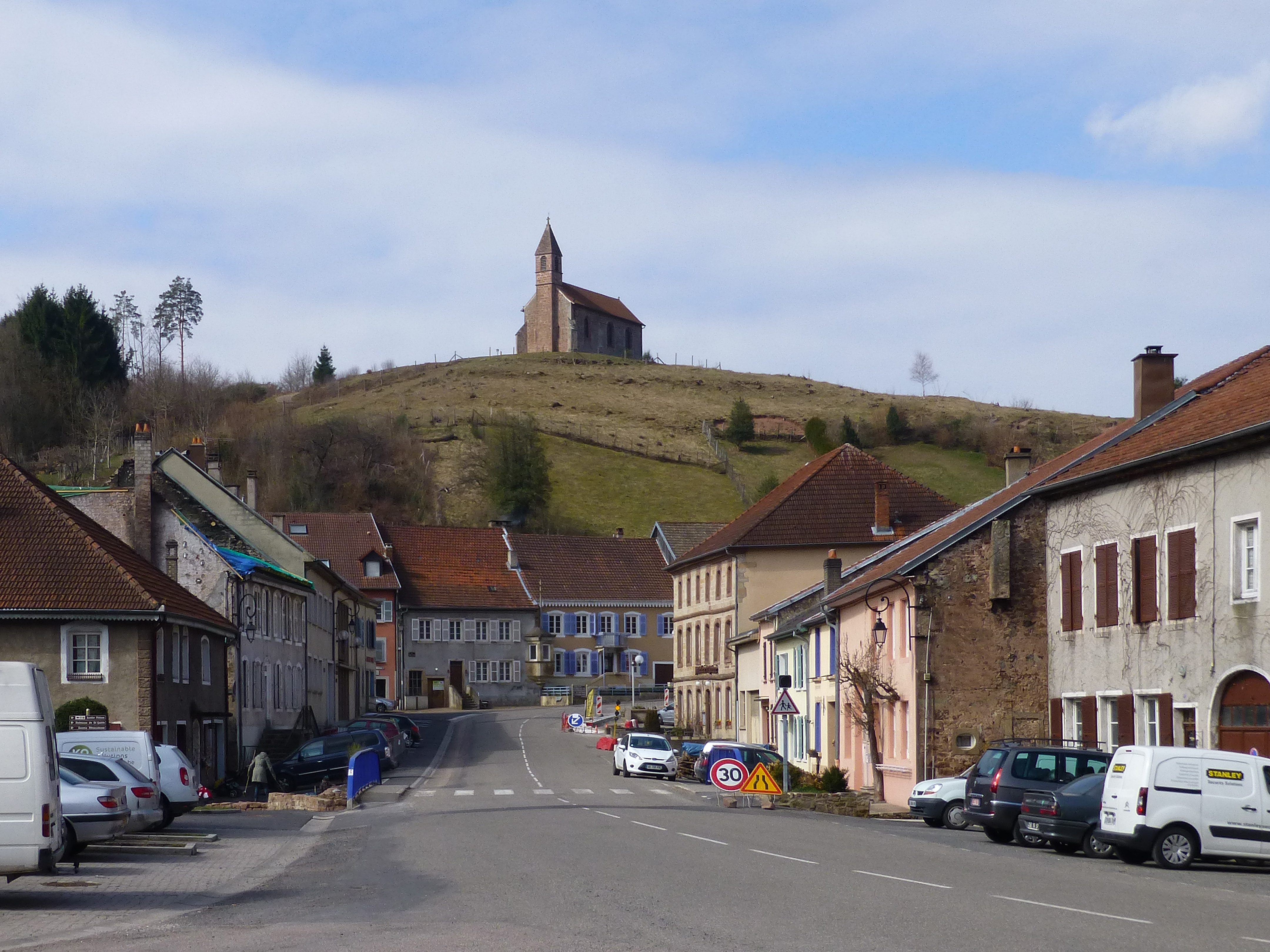 Le village de Saint-Quirin (Moselle), surplombé par la Haute Chapelle